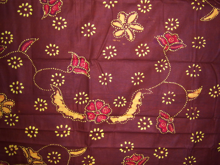 Basa Jawa: Gambar batik